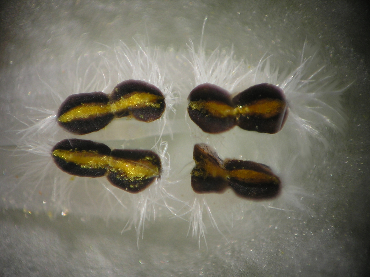 Lamium album, Jasnota biała, Białowieża, Polska